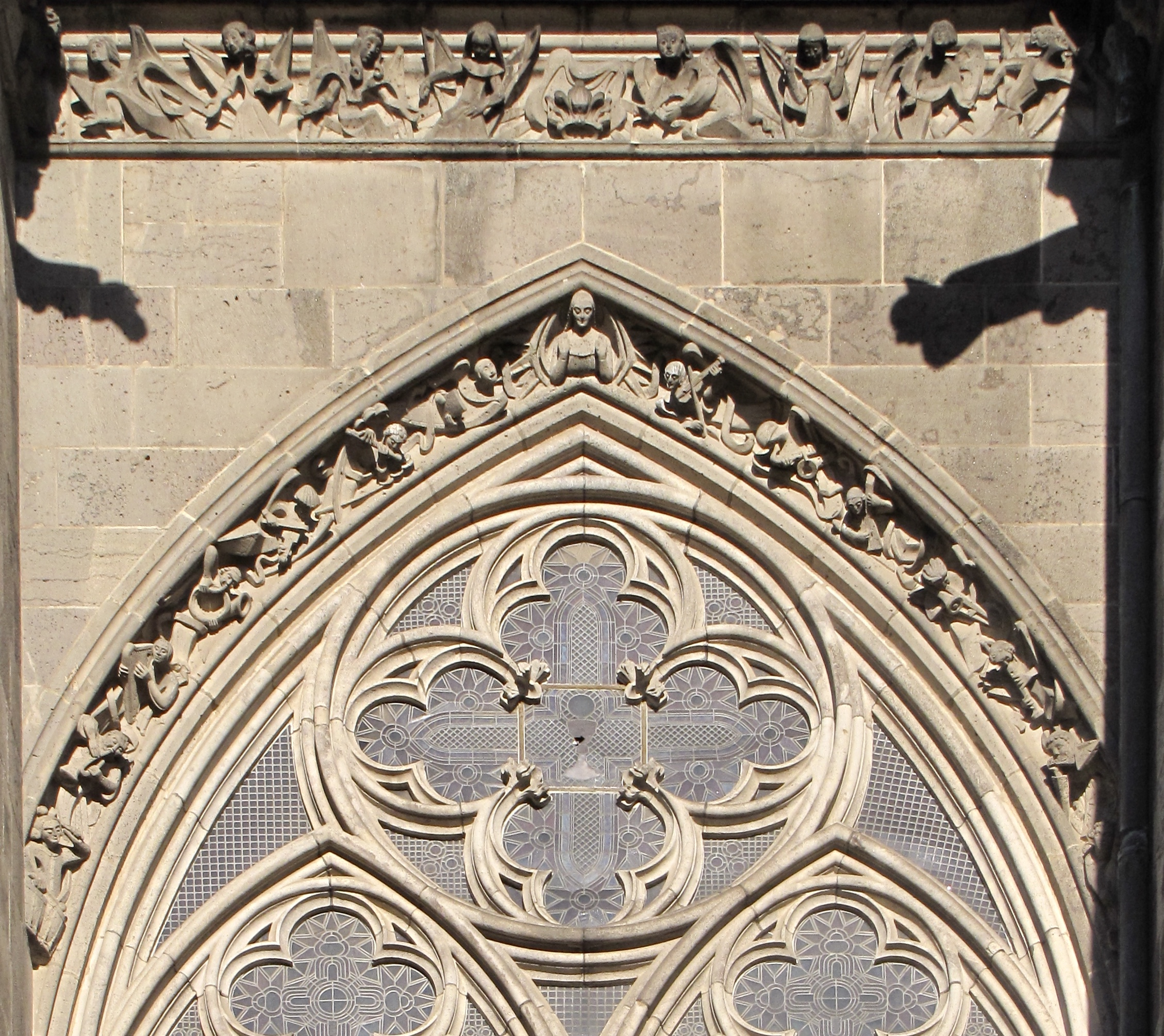 Kölner Dom: Die musizierenden Engel am Bogenlauf eines südlichen Fensters im Langhaus wurden 1954 von den Steinmetzen Ewald Bell und Gerhard Stoll geschaffen, wo im 19. Jahrhundert nur Laubwerk geformt worden war. Es gilt als gelungenes Beispiel für die sogenannte Schöpferische Denkmalpflege.